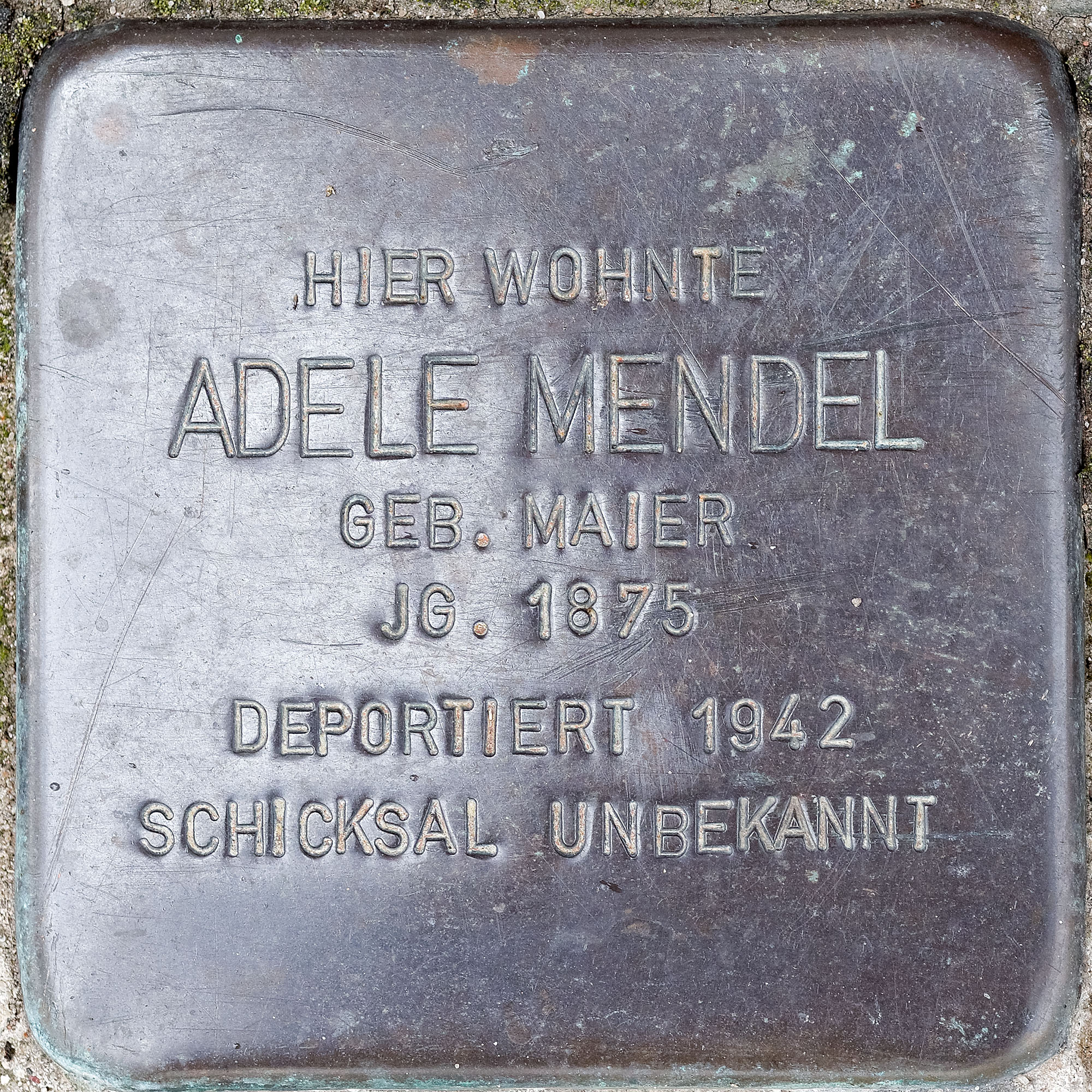 2017 07 16 Stolpersteine Kerken Mendel Adele